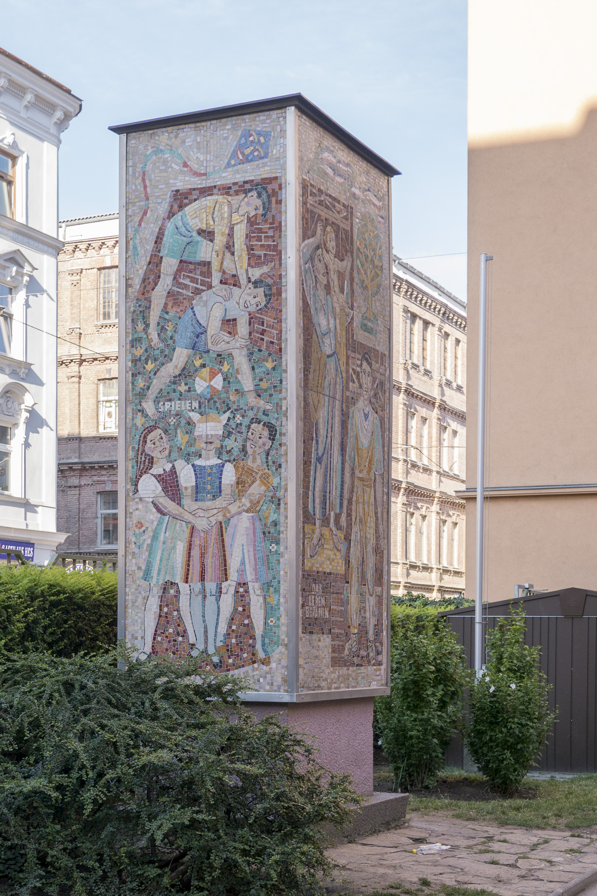 Mosaikpfeiler